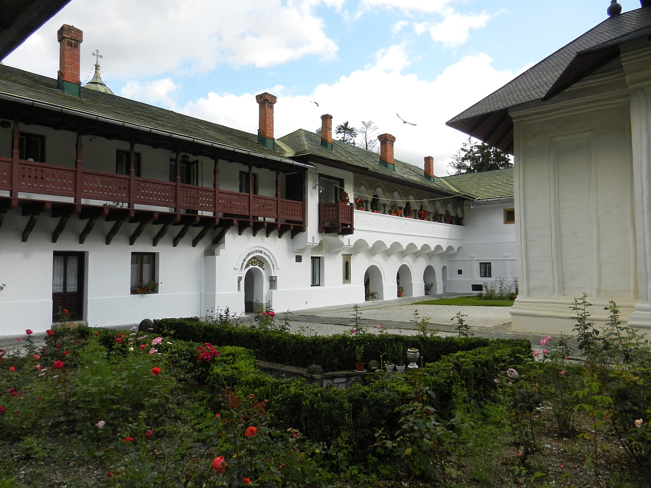 Stăreție 03